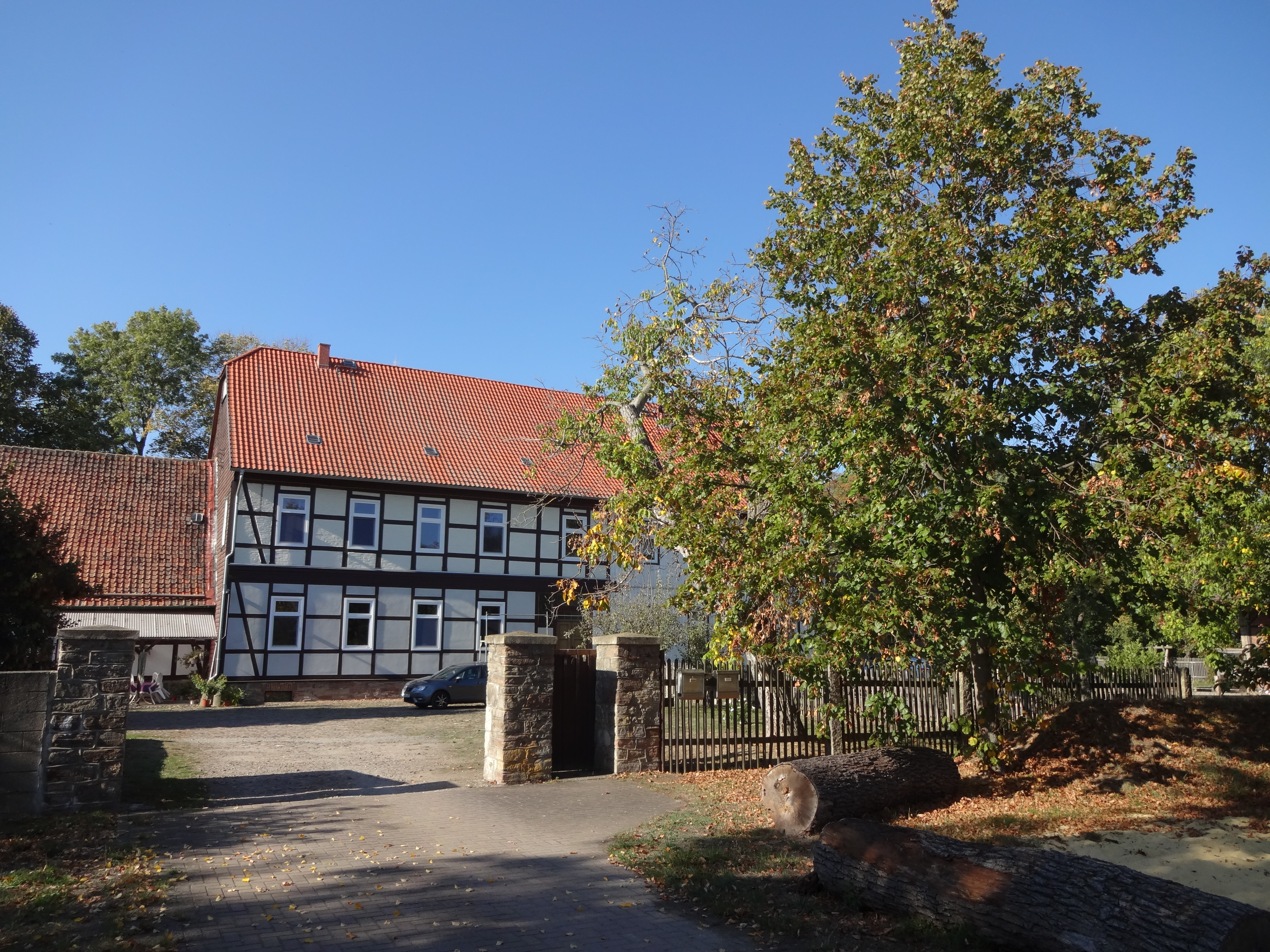 Teil der denkmalgeschützten ehemaligen Domäne in Schmatzfeld (Gemeinde Nordharz)